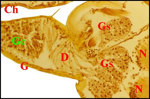 Coupe parasagittale du prosoma de Leptoneta fagei mâle montrant les glandes "salivaires" "classiques" et les glandes "sexuelles".